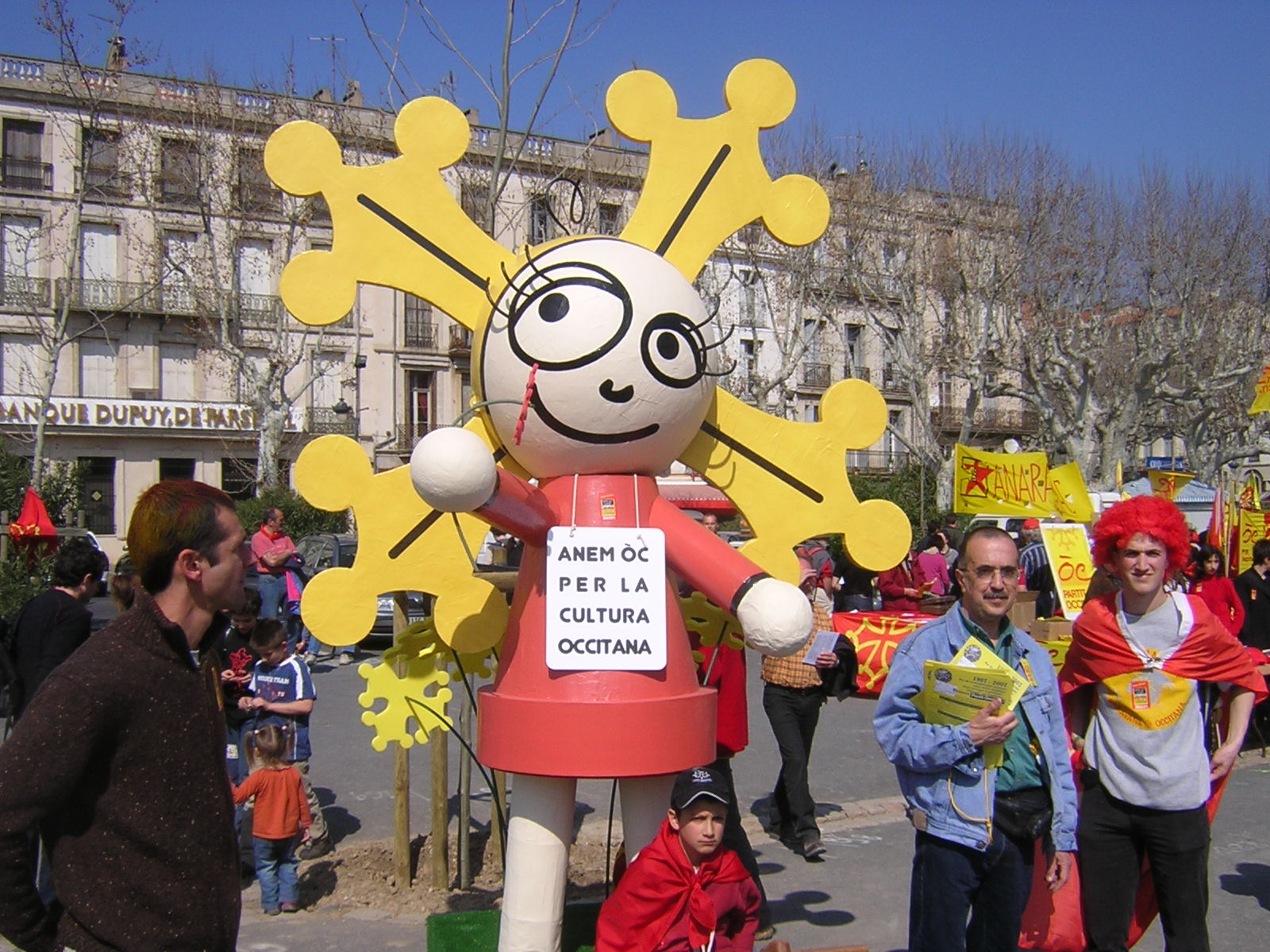 Manifestação na Occitânia